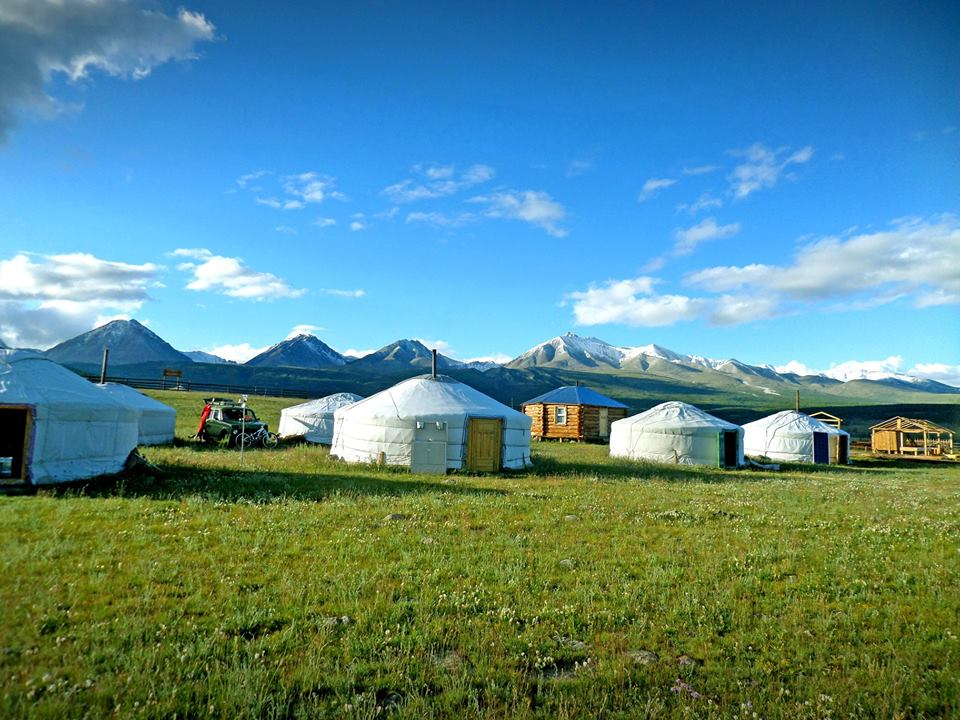 Монгол: Doloon uul tourist camp